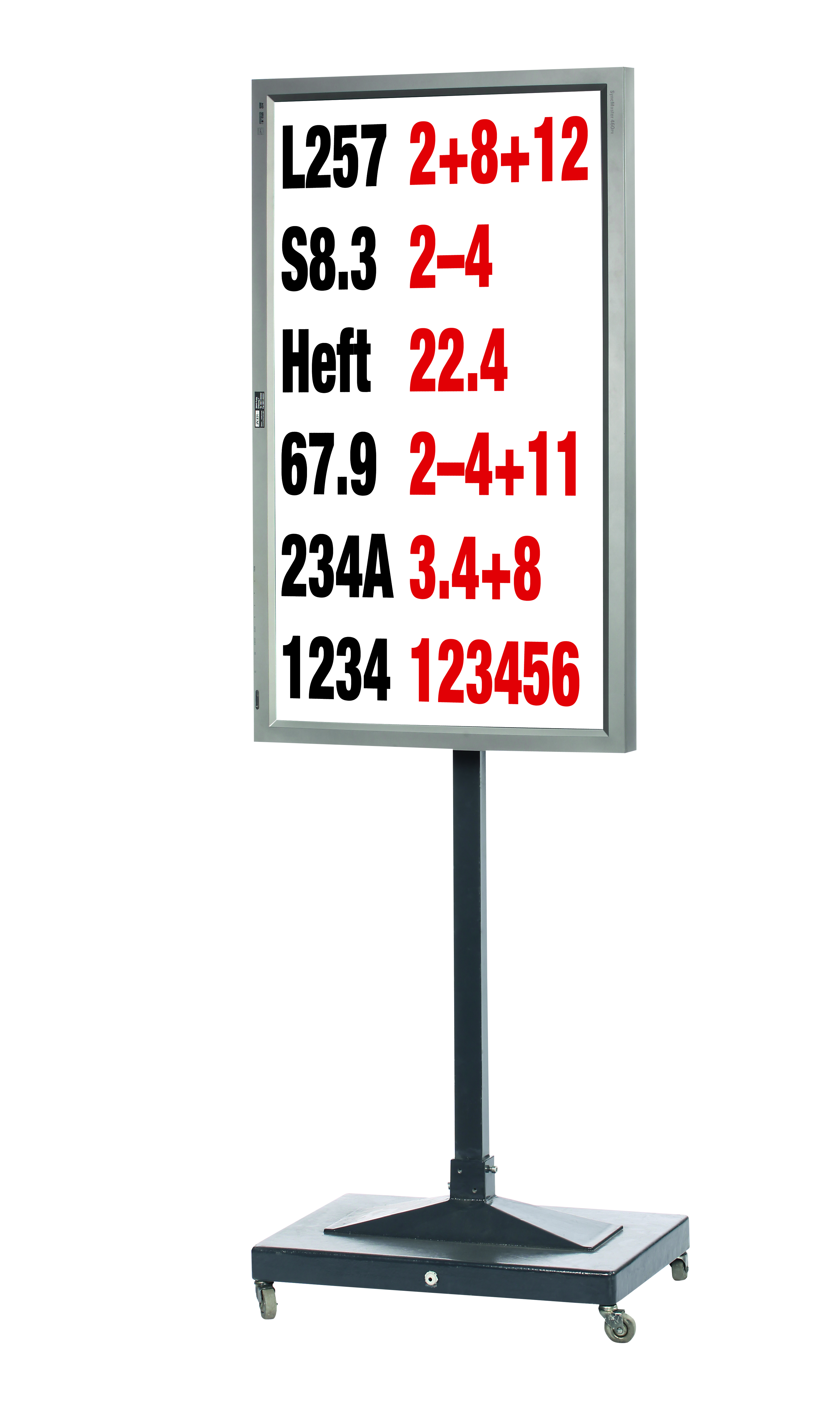 Liedanzeiger als Flachanzeige mit LCD, Hersteller Fa. Jäger